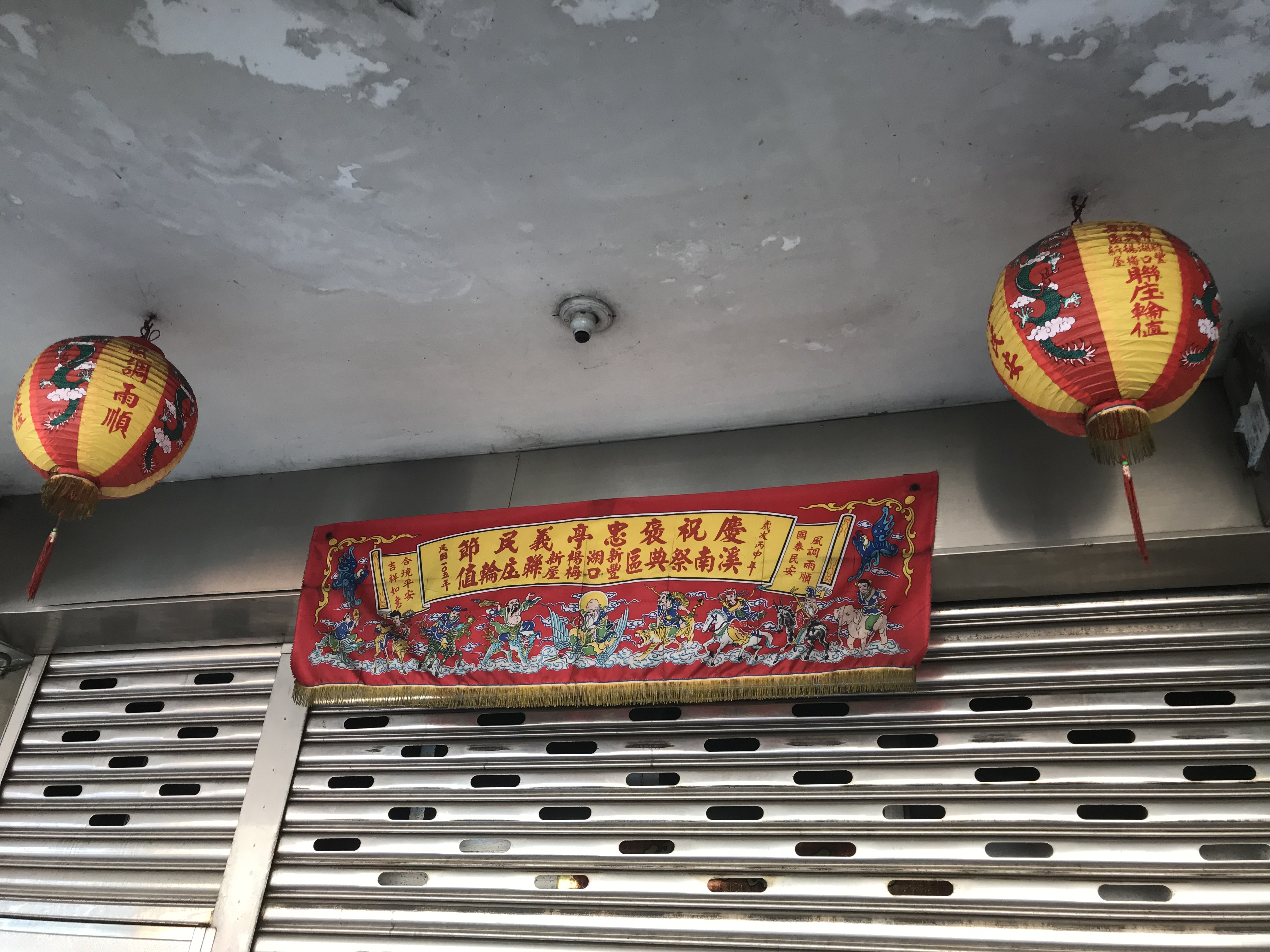 中文（台灣）: 富岡車站附近民宅懸掛的2016年溪南慶典區聯庄輪值的八仙彩。